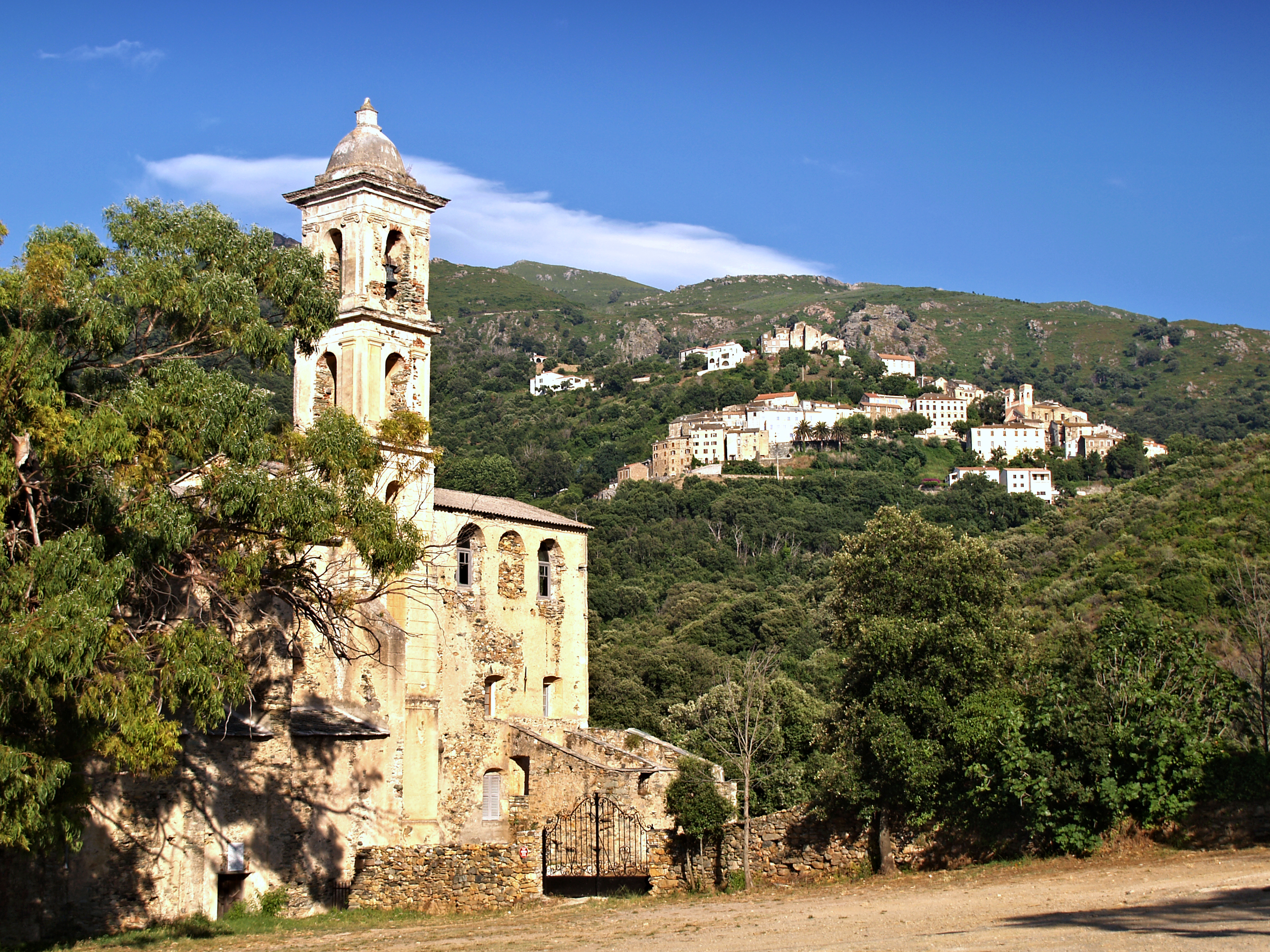 Oletta (Corse) - Couvent Saint-François. Au fond le village d'Oletta